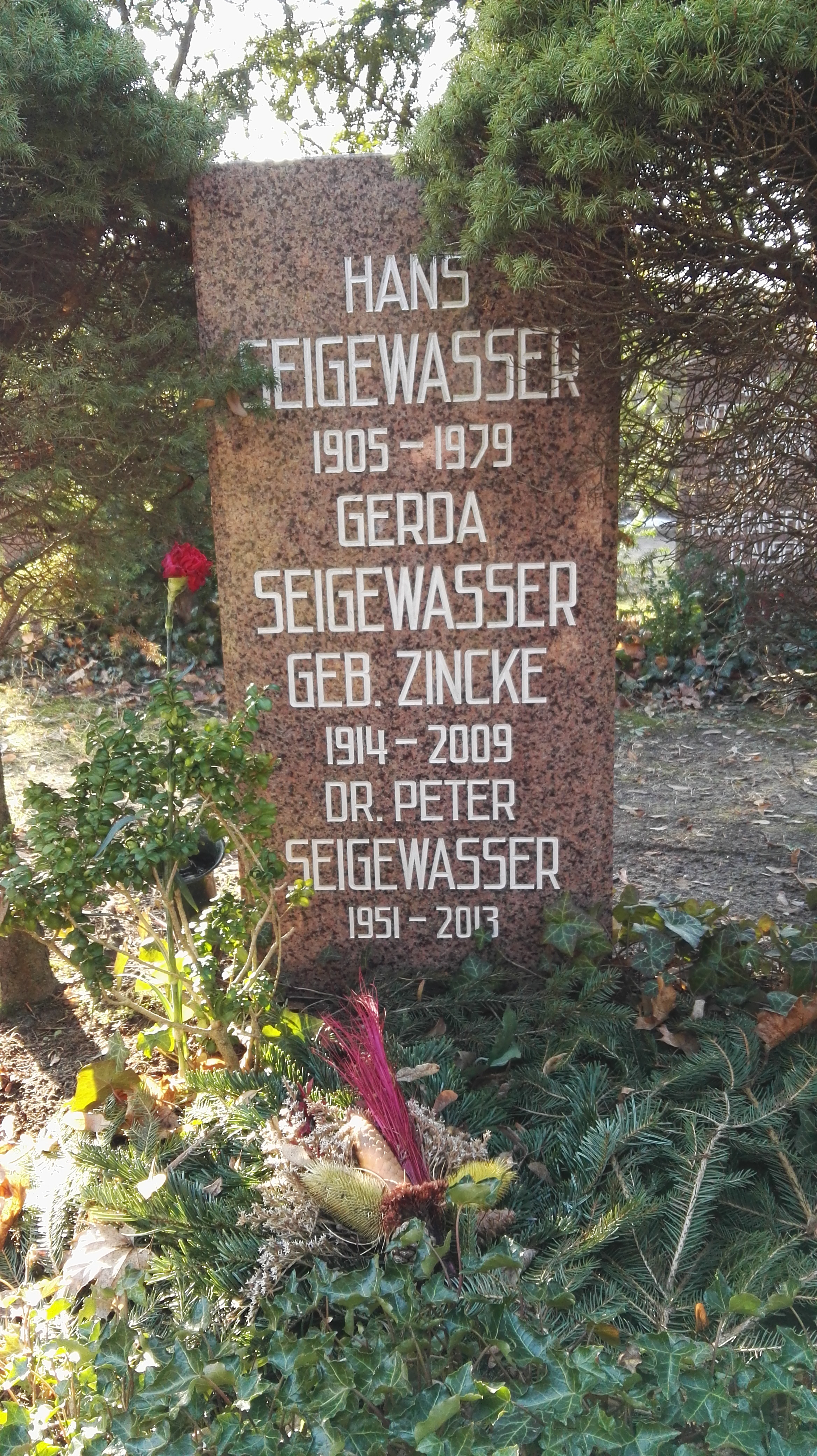 Grab von Hans Seigewasser, Gerda Seigewasser und Dr. Peter Seigewasser in der Grabanlage Pergolenweg auf dem Sozialistenfriedhof des Zentralfriedhofs Friedrichsfelde